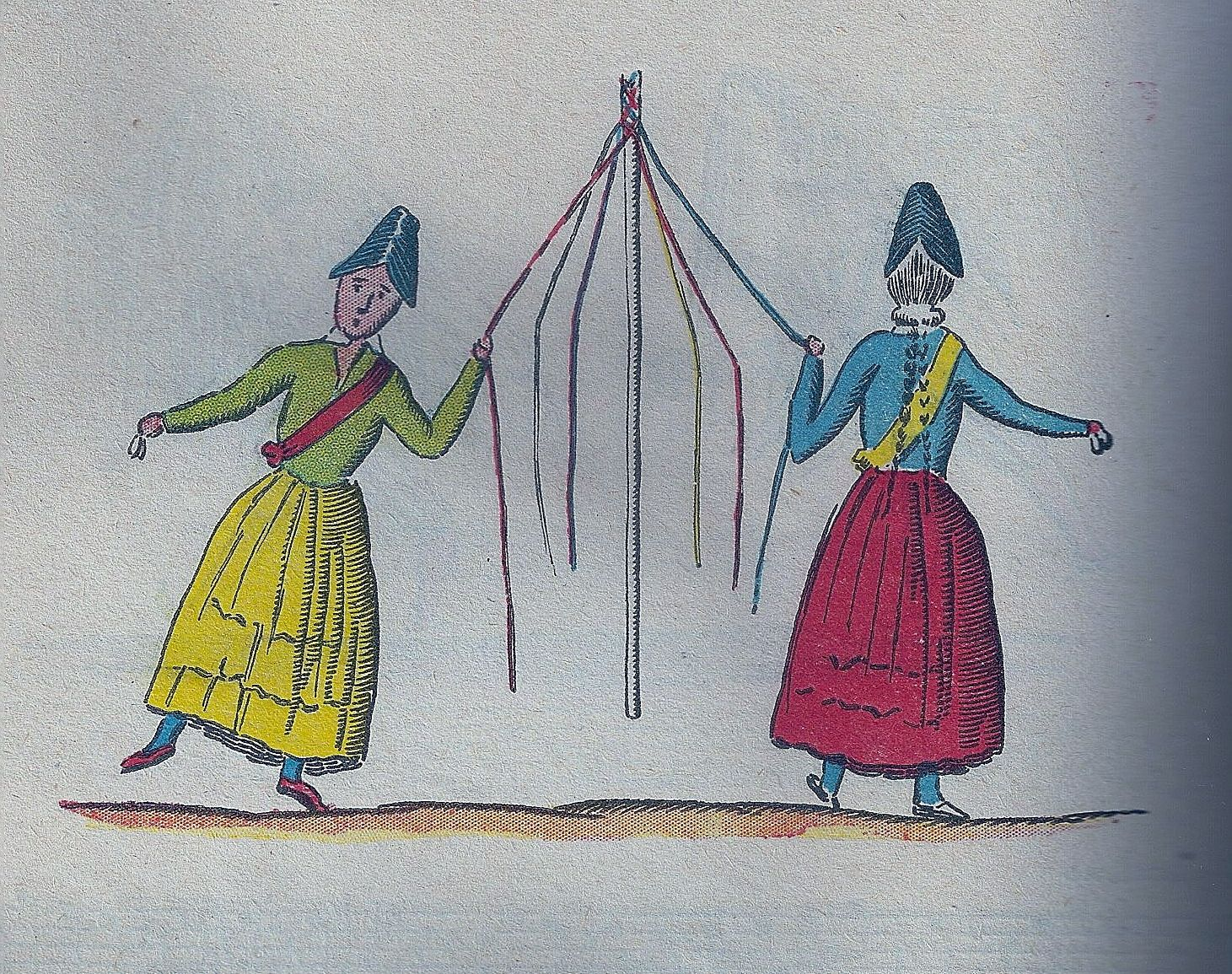 Reproducció d'un dibuix d'Andreu de Bofarull